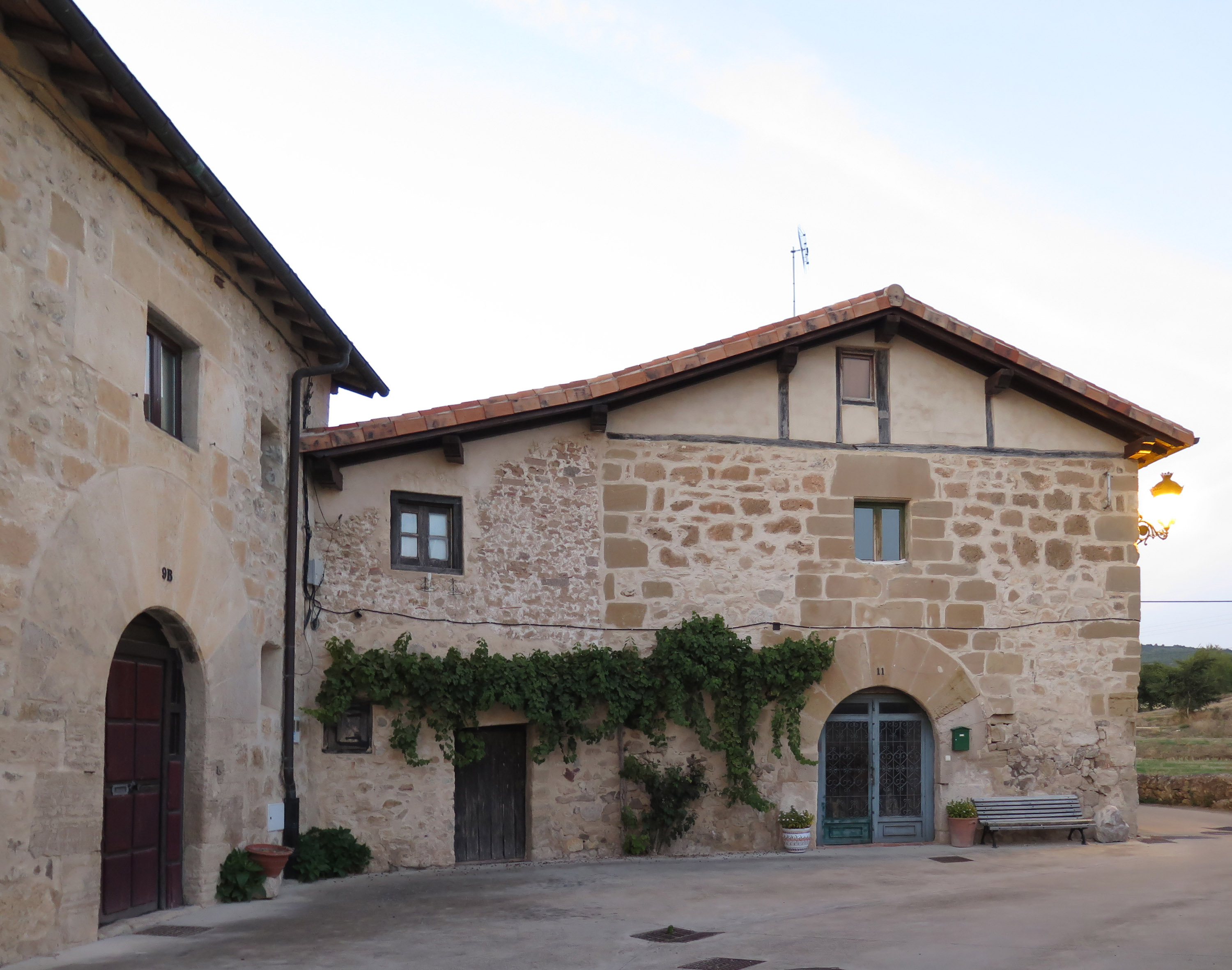 Caserío de Santa Cruz del Fierro (Álava)